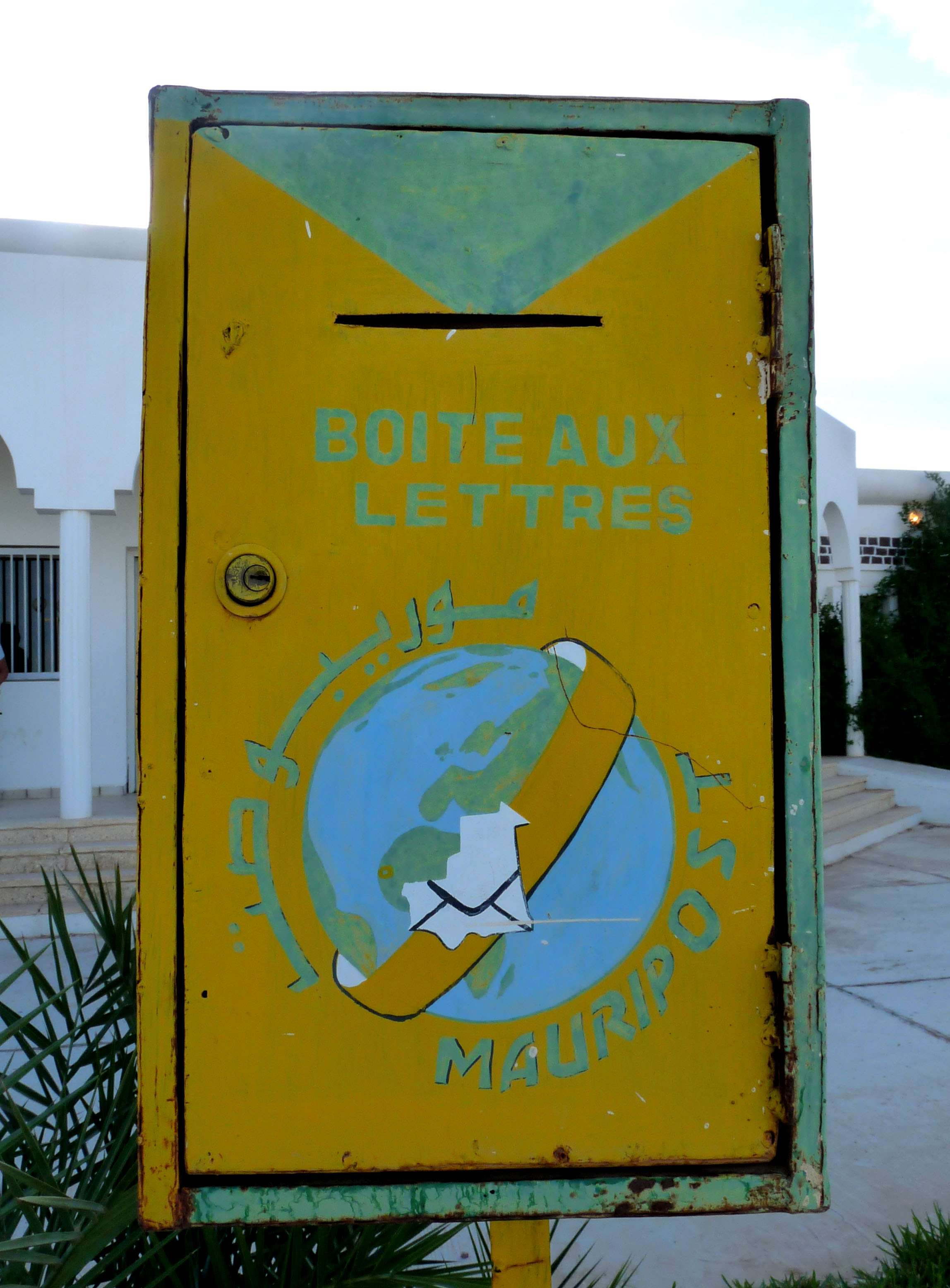 Boîte aux lettres à l'Aéroport international d'Atar (Mauritanie)